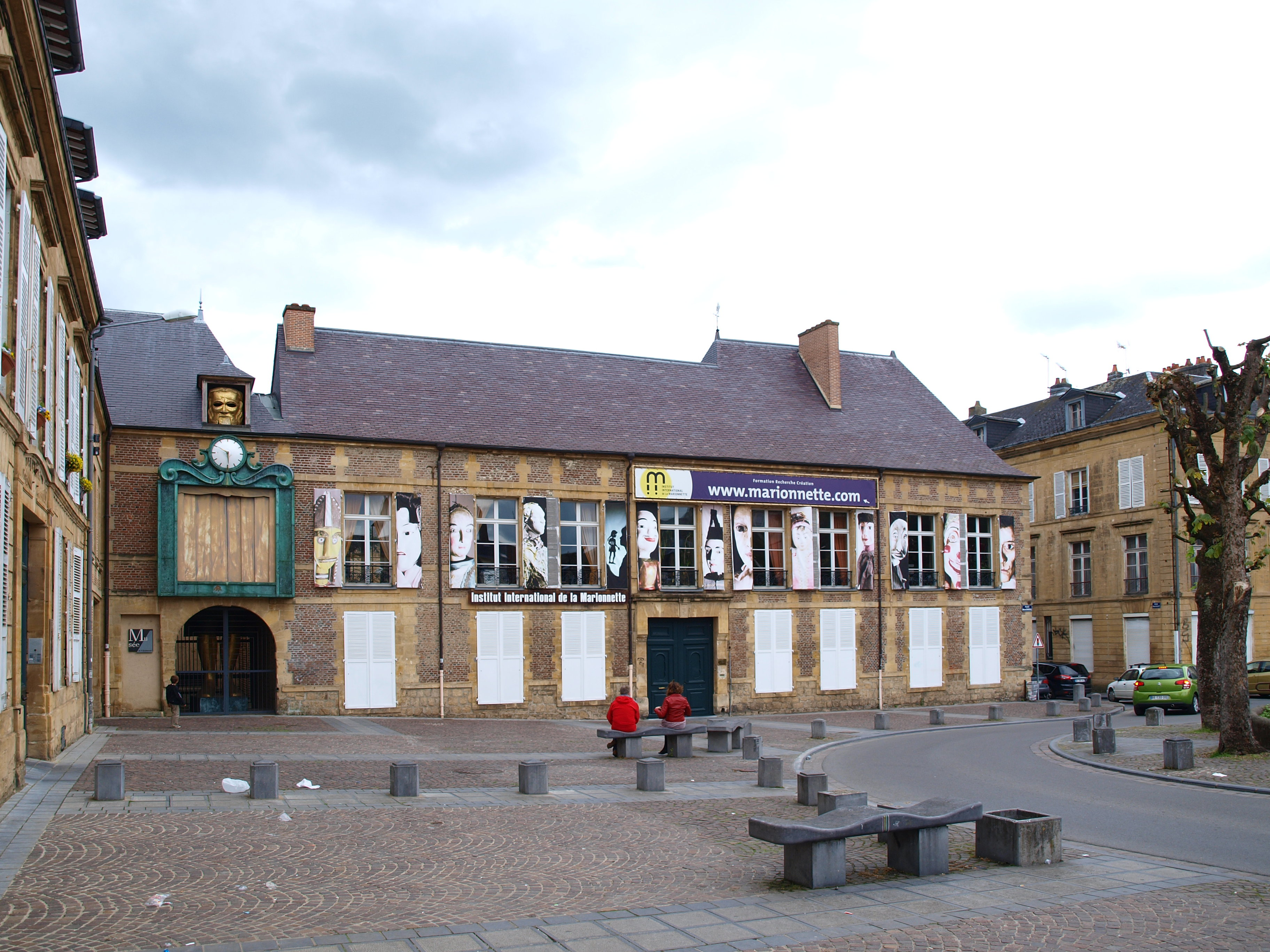 Charleville-Mézières (Ardennes, France) ; l'Institut international de la Marionnette.